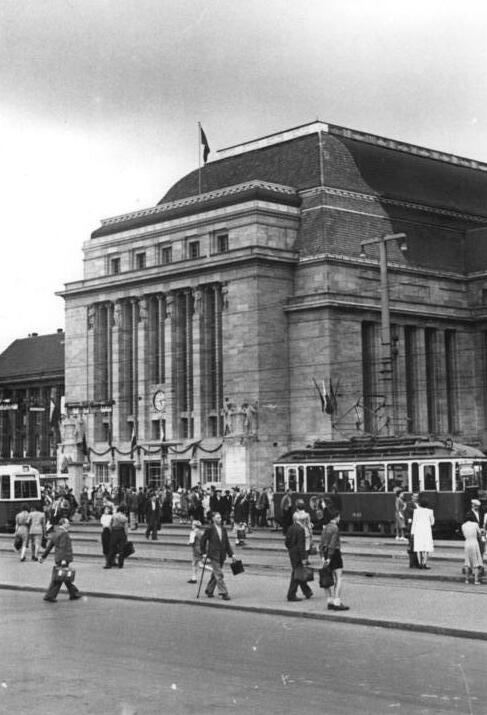 Leipzig, Hauptbahnhof, Westhalle, Eingang Illus Illner 29.8.51 Von den Vorbereitungen zur Leipziger Herbstmesse vom 2.-7.9.1951 In diesen Tagen werden in Leipzig die letzten Vorbereitungen zur diesjährigen Herbstmesse, die vom 2.-7.9.51 stattfindet, getroffen. UBz: Blick auf den Eingang der wiederaufgebauten Westhalle des Leipziger Hauptbahnhofs. Die Wiederherstellung der während des Krieges zerstörten Westhalle konnte durch Sonderleistungen der Bauarbeiter um drei Moante vorfristig zur diesjährigen Herbstmesse beendet werden.